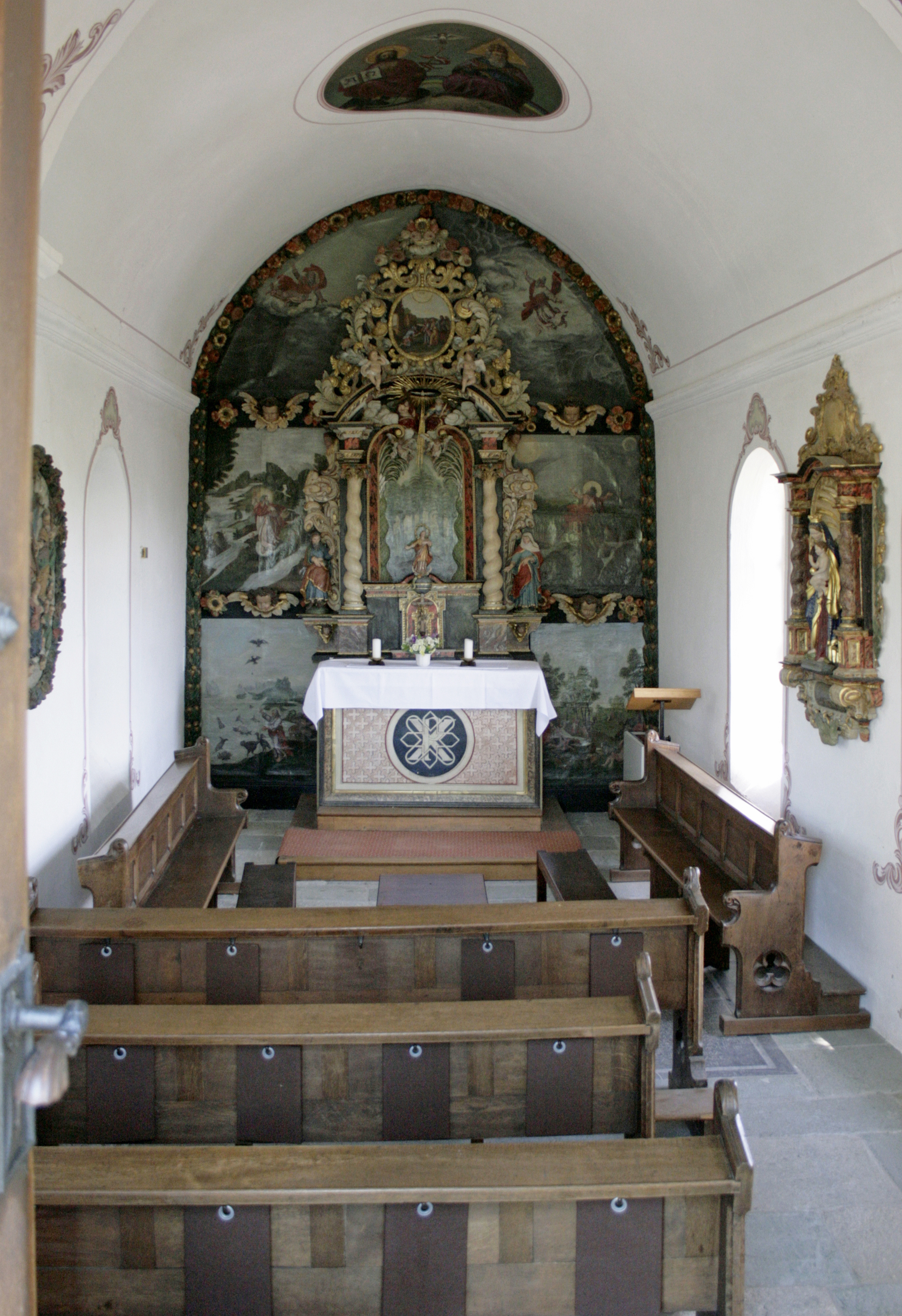 Lubentiusstift Dietkirchen, Deutschland, Dreifaltigkeitskapelle